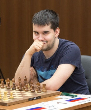 Ян Непомнящий